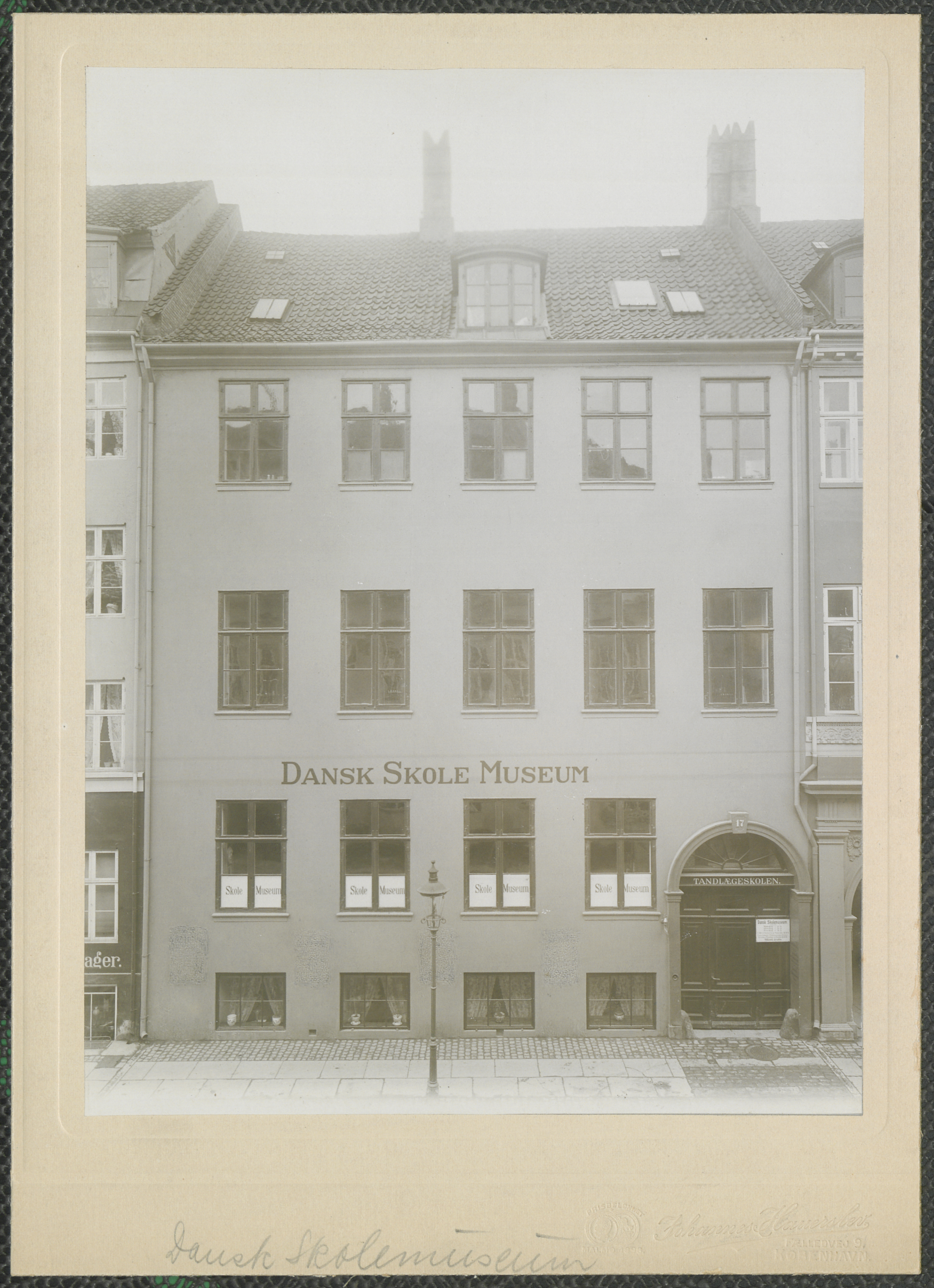 Dansk Skolemuseum, Stormgade 17. Foto taget før 1909. Fotograf ukendt.